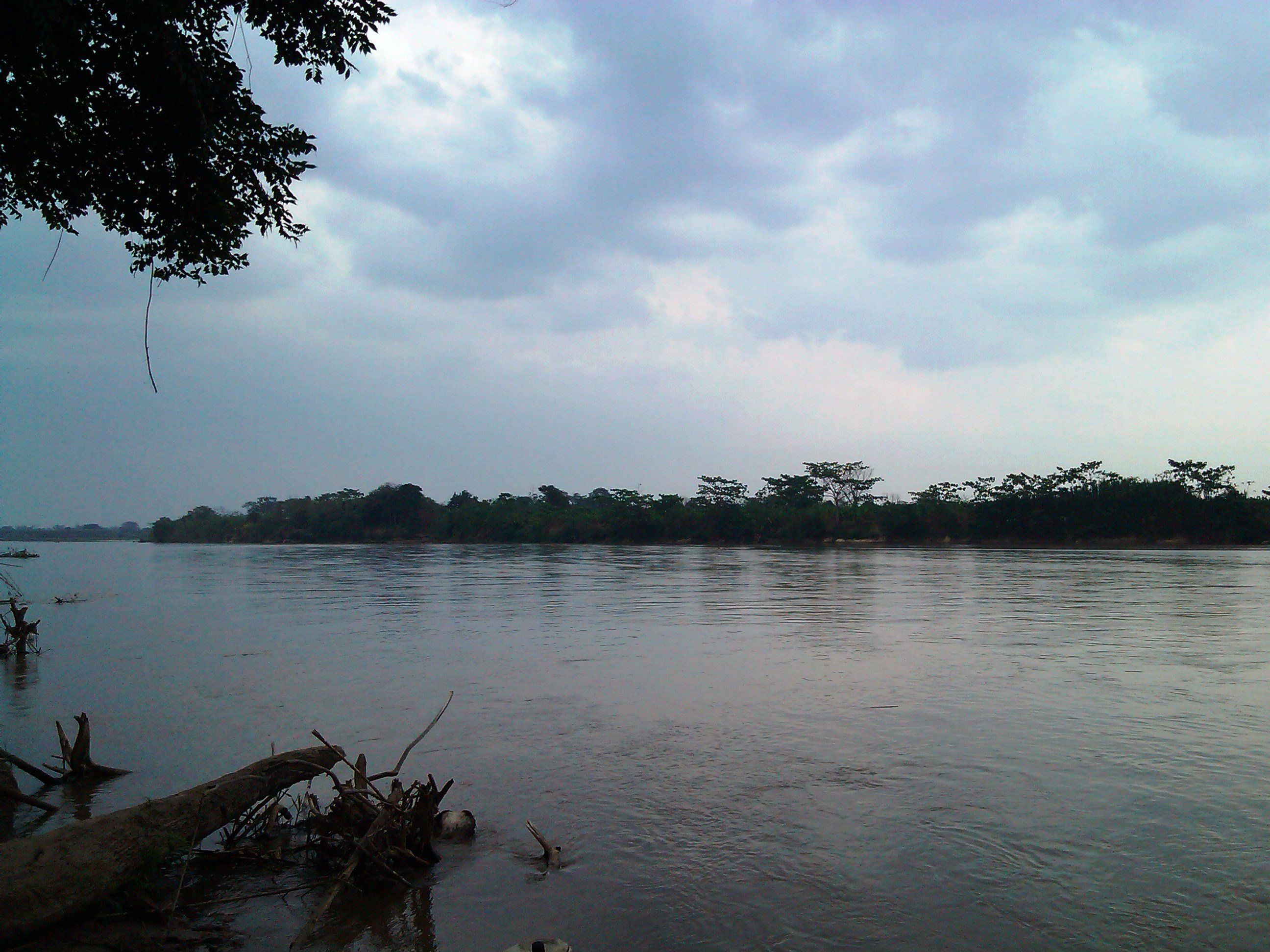 Rio Apure, Estado Barinas.